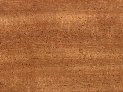 Mahoń afrykański rodz. Khaya - okleina